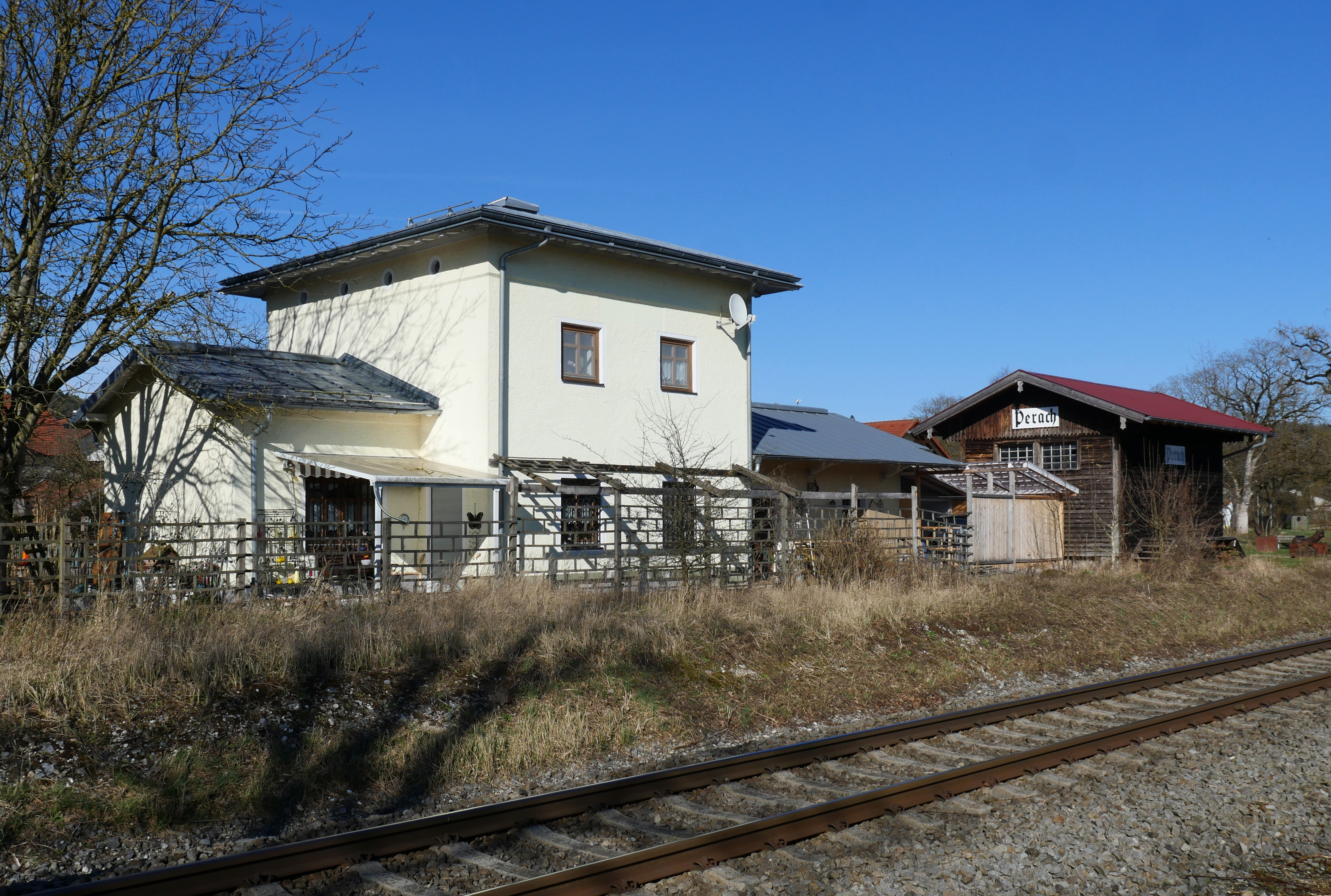 Empfangsgebäude und Güterschuppen des 1986 aufgelassenen Bahnhofs Perach von der Gleisseite, heute als Wohnhaus genutzt.